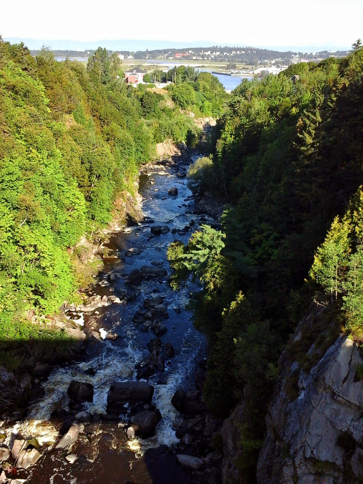 Gorge of the Rivière du Loup at Rivière-du-Loup, Quebec, Canada